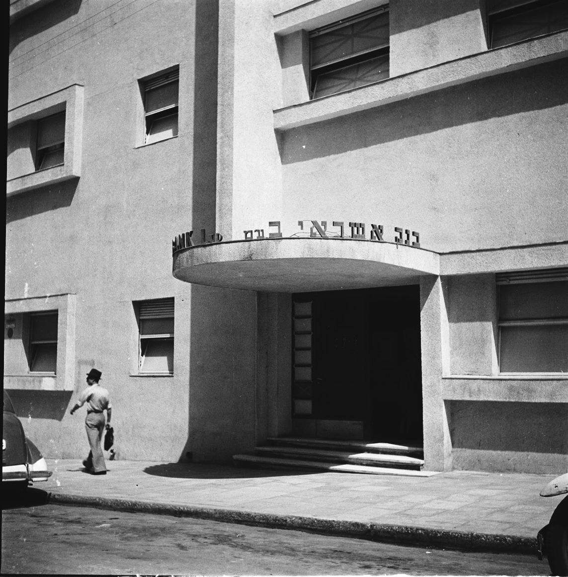 אוסף צילומים של הצלם זולטן קלוגר טווח מספרי התשלילים 18251 - 18419: A.T.S. - חיל נשים - בבית החולים